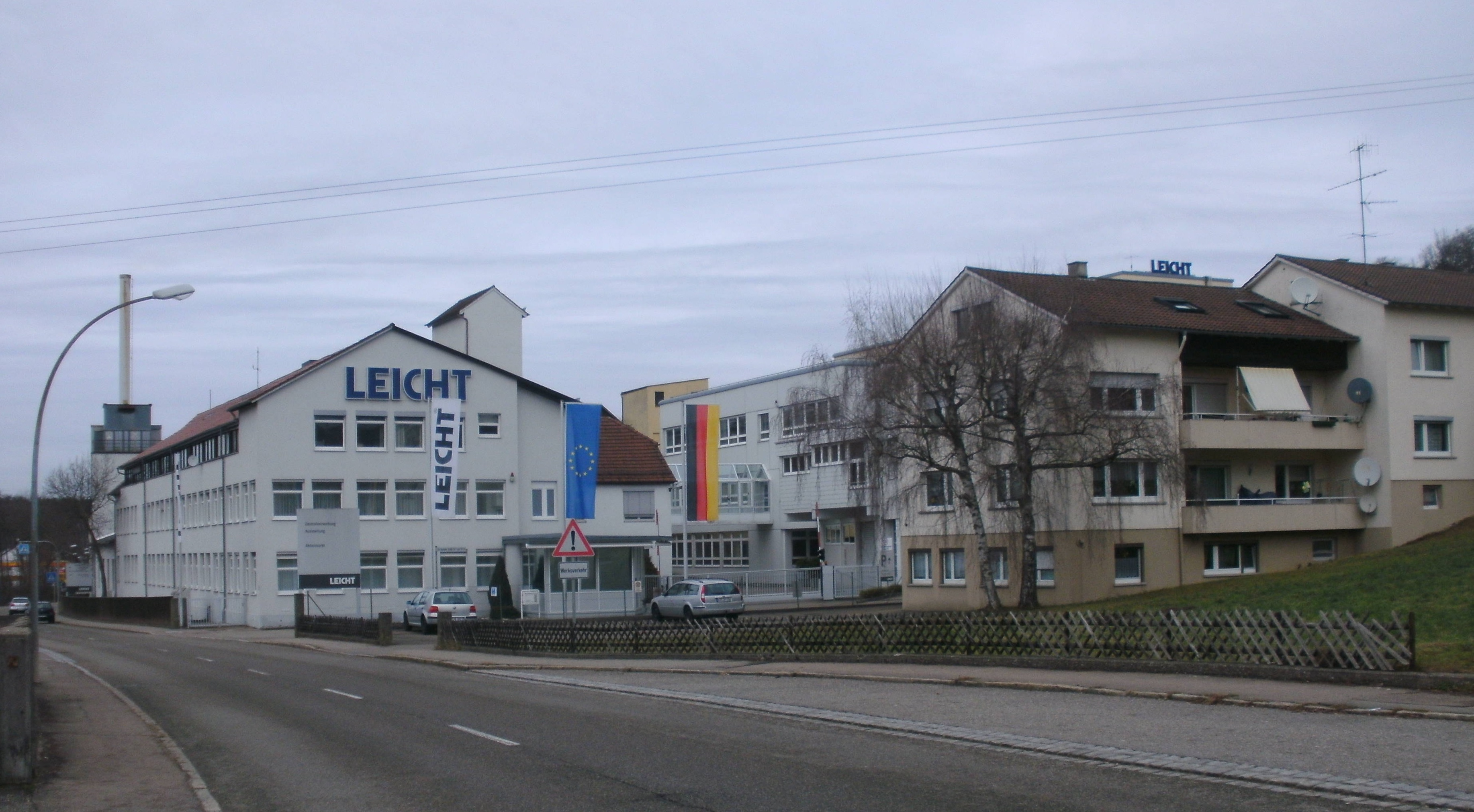 Firmengebäude der Leicht Küchen in Waldstetten (Ostalbkreis)